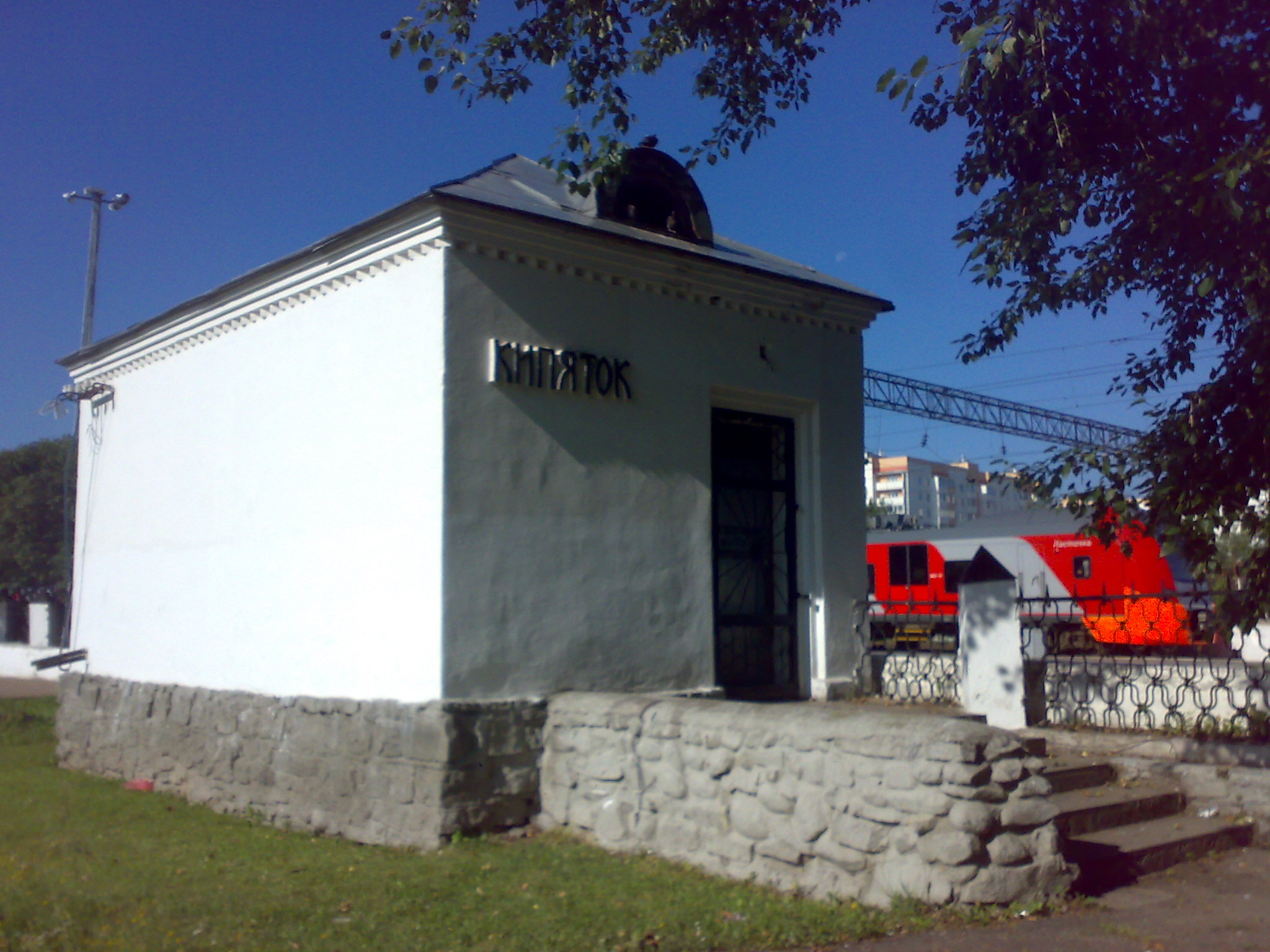 Новгород на Волхове. Кубовая .